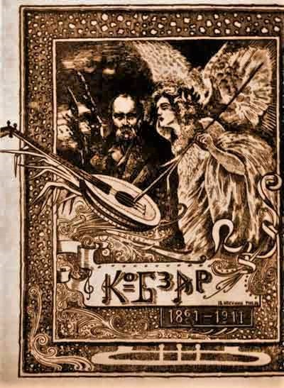 Обкладинка "Кобзаря" 1911 року